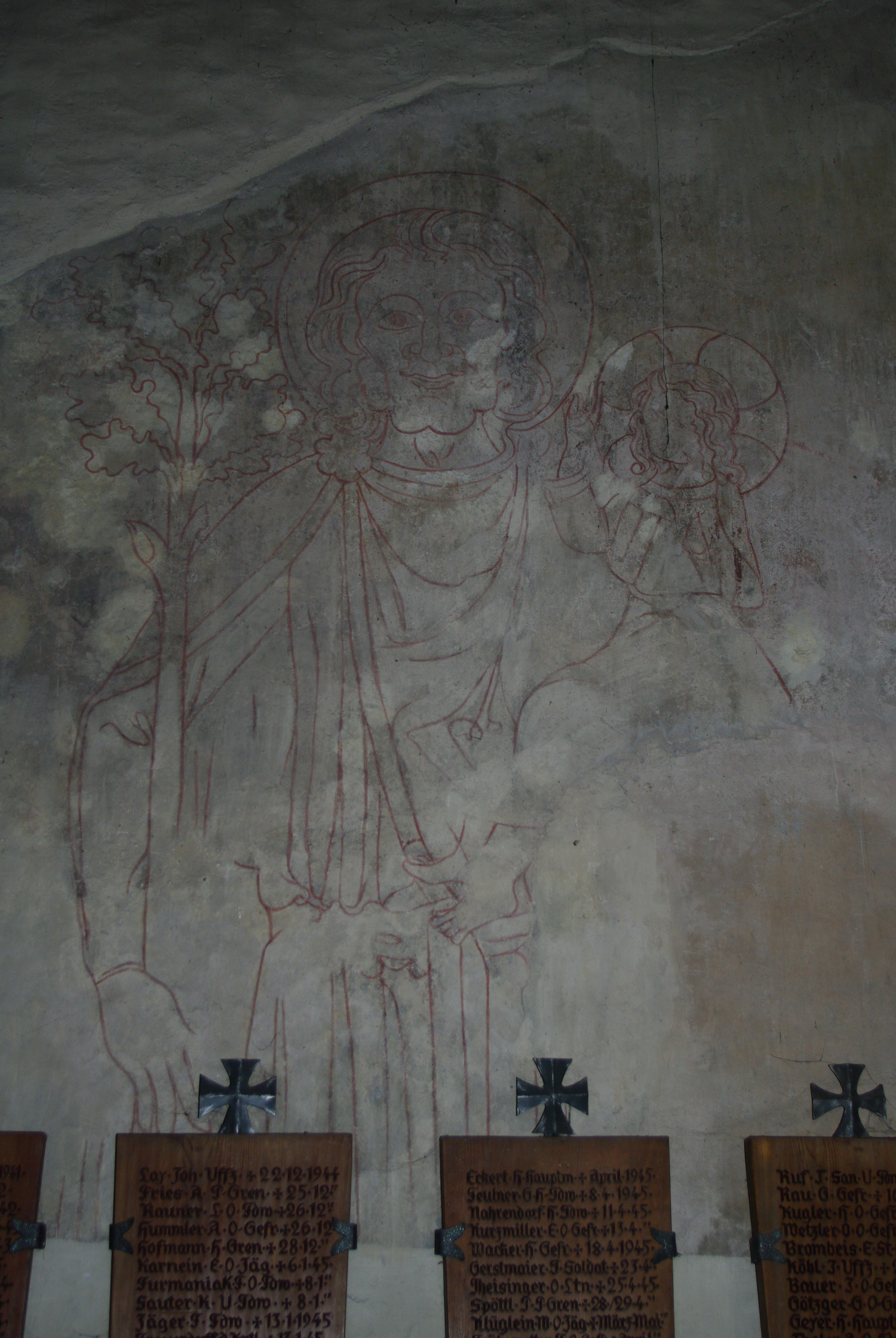 Heiliger Christophorus, um 1300